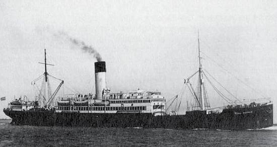 Die RAUL SOARES ex CAP VERDE